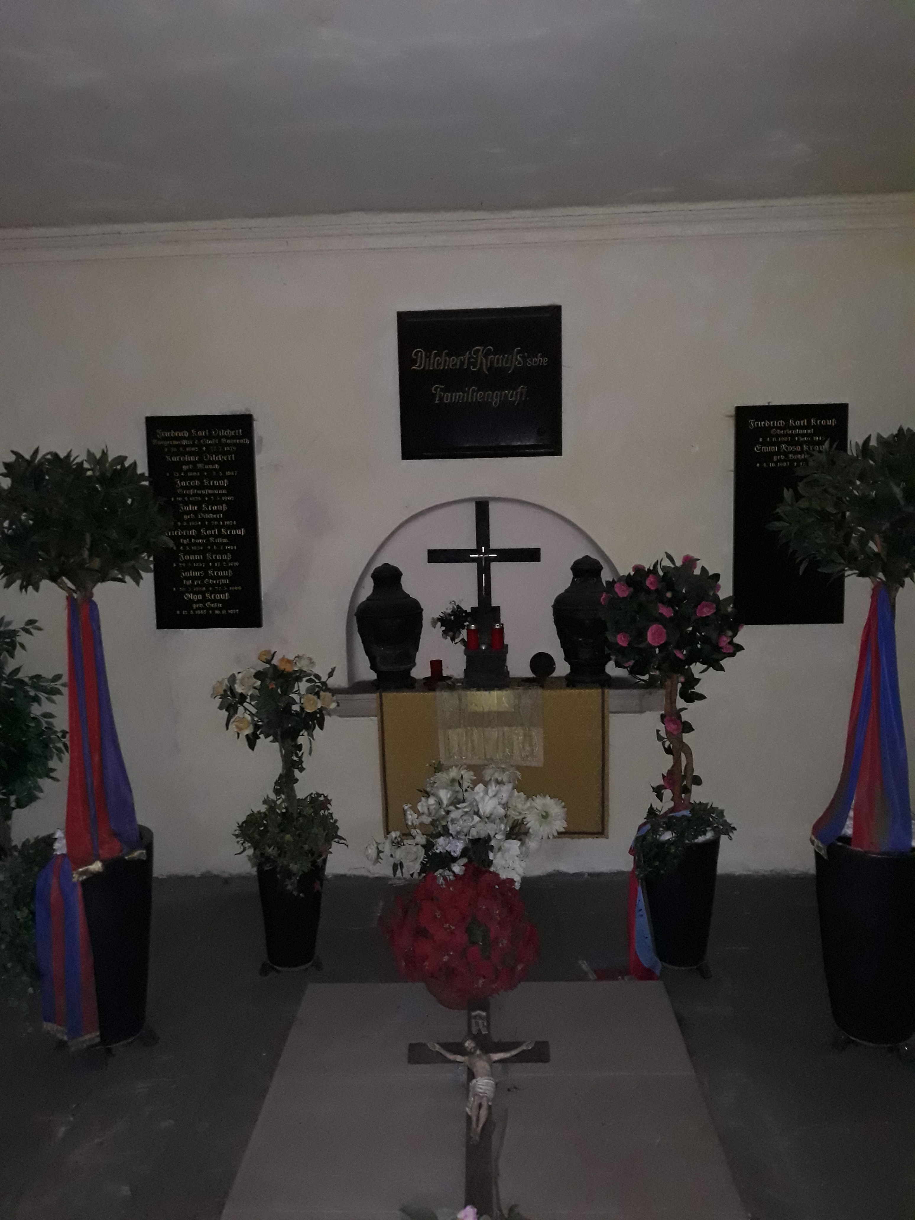 Gruft der Bayreuther Familie DIlchert auf dem Stadtfriedhof Bayreuth, darunter der Bayreuther Bürgermeister und Mäzen Friedrich Carl Dilchert.